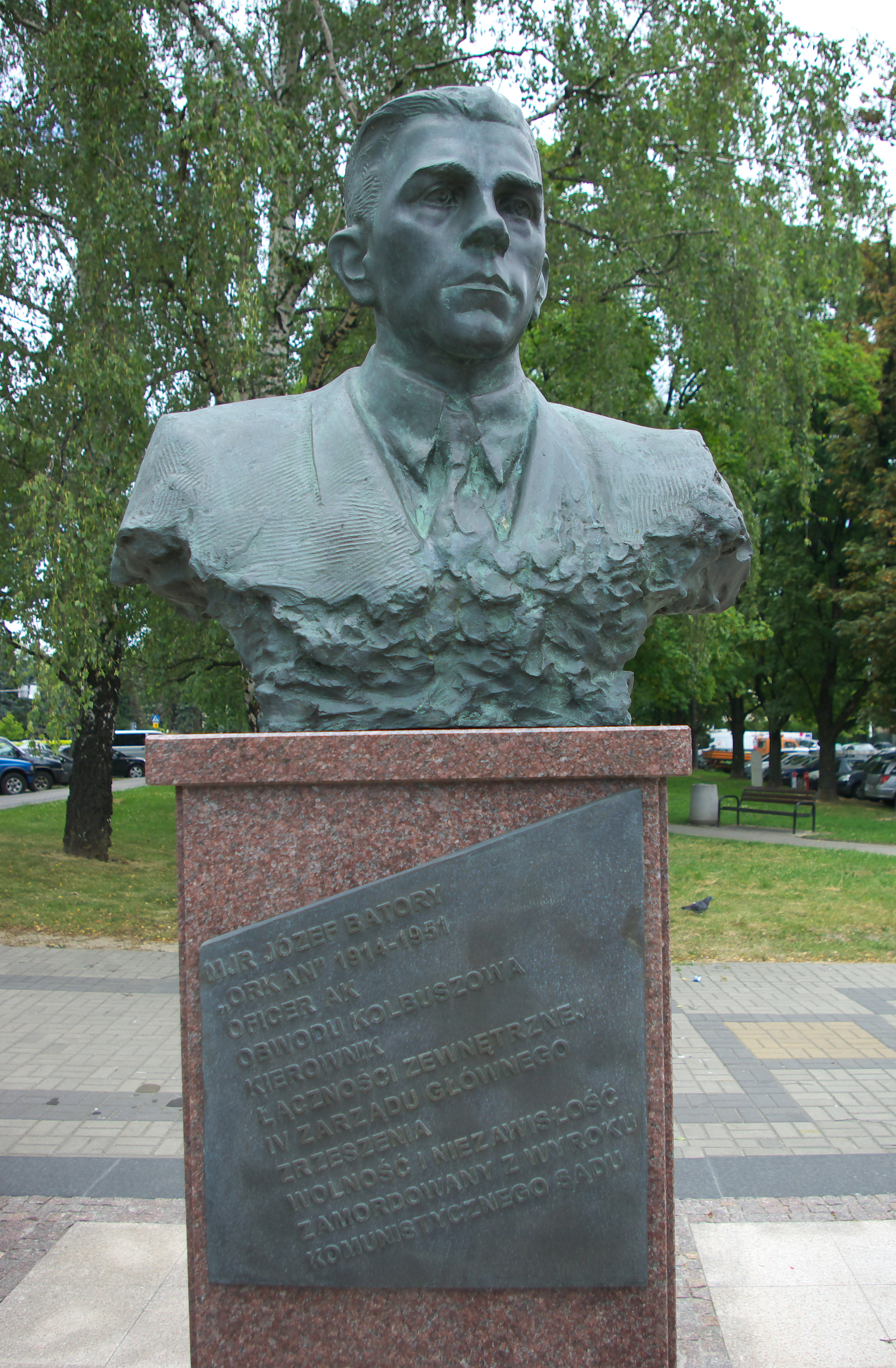 Pomnik Żołnierzy Wyklętych w Rzeszowie przy Alei Łukasza Cieplińskiego. Upamiętniony Józef Batory